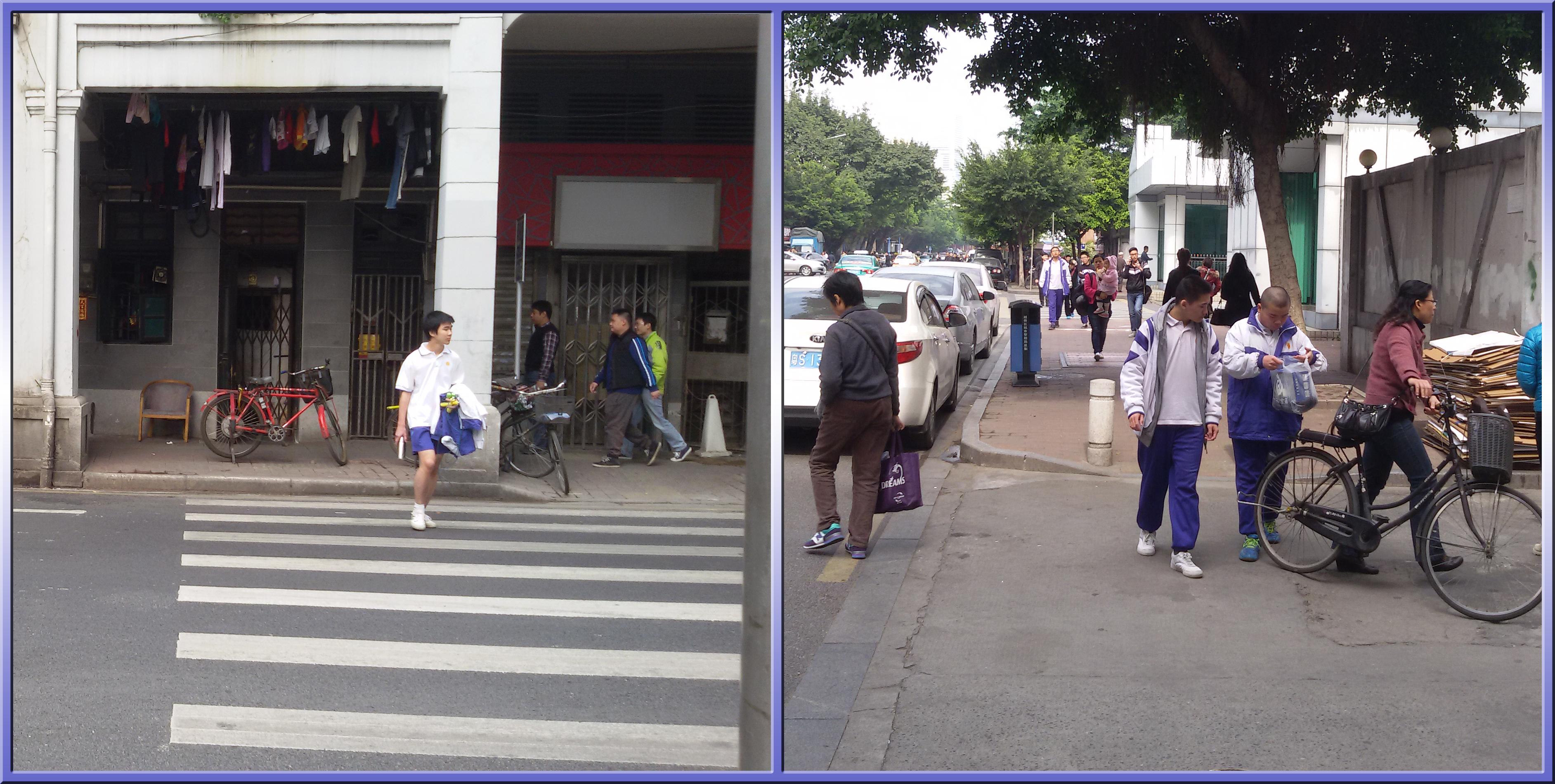 粵語: 廣州市第卌中學嘅校服